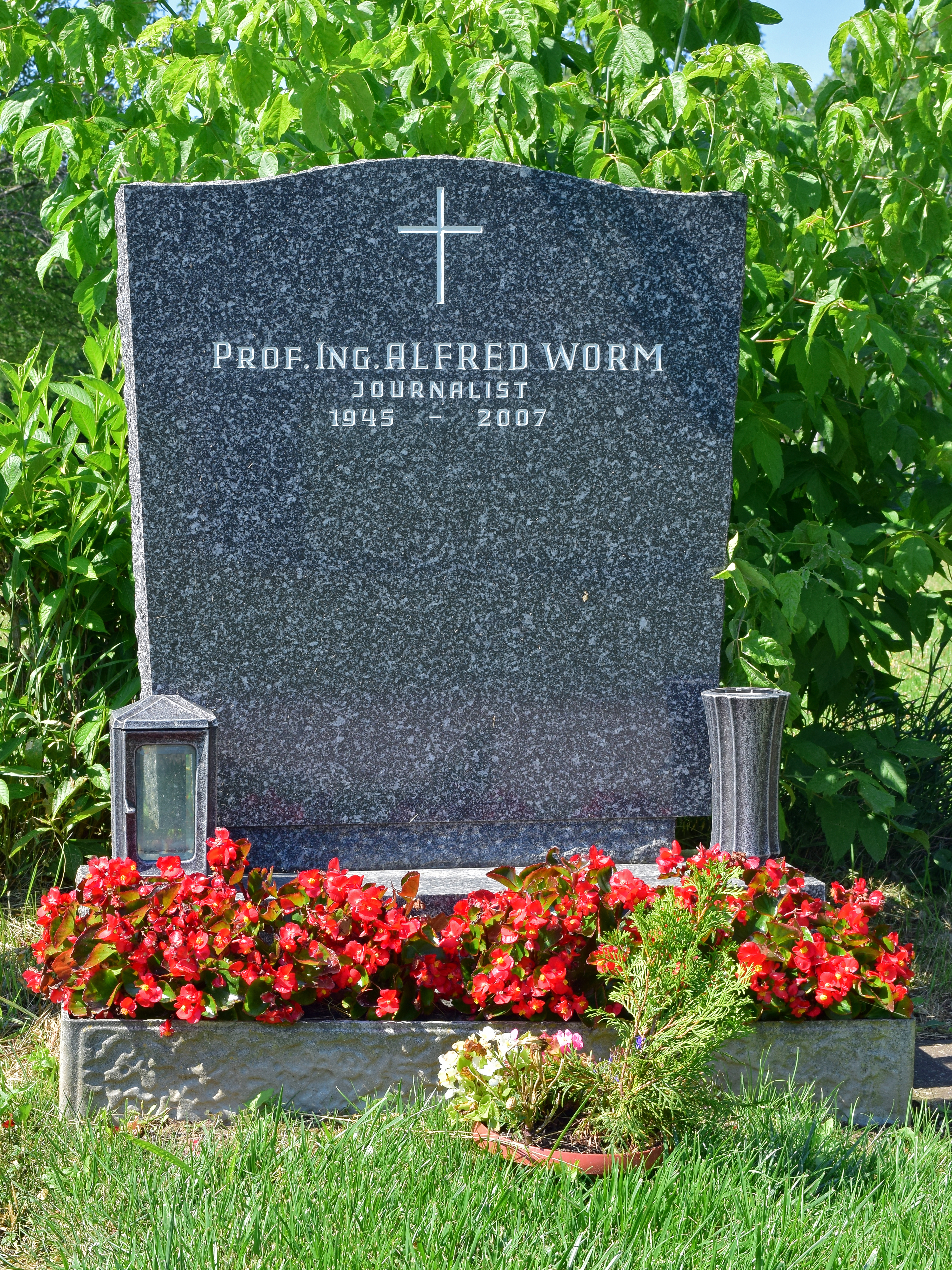 Ehrengrab von Alfred Worm auf dem Wiener Zentralfriedhof, Gruppe 40.